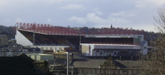 Valley Parade stadium, Bradford